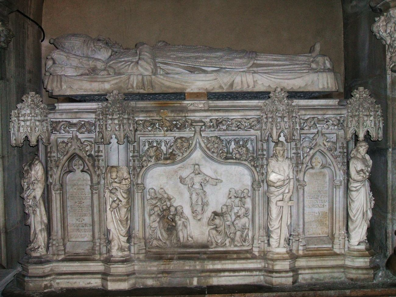 Sepulcro episcopal en la cripta de la Catedral Nueva de Vitoria-Gasteiz